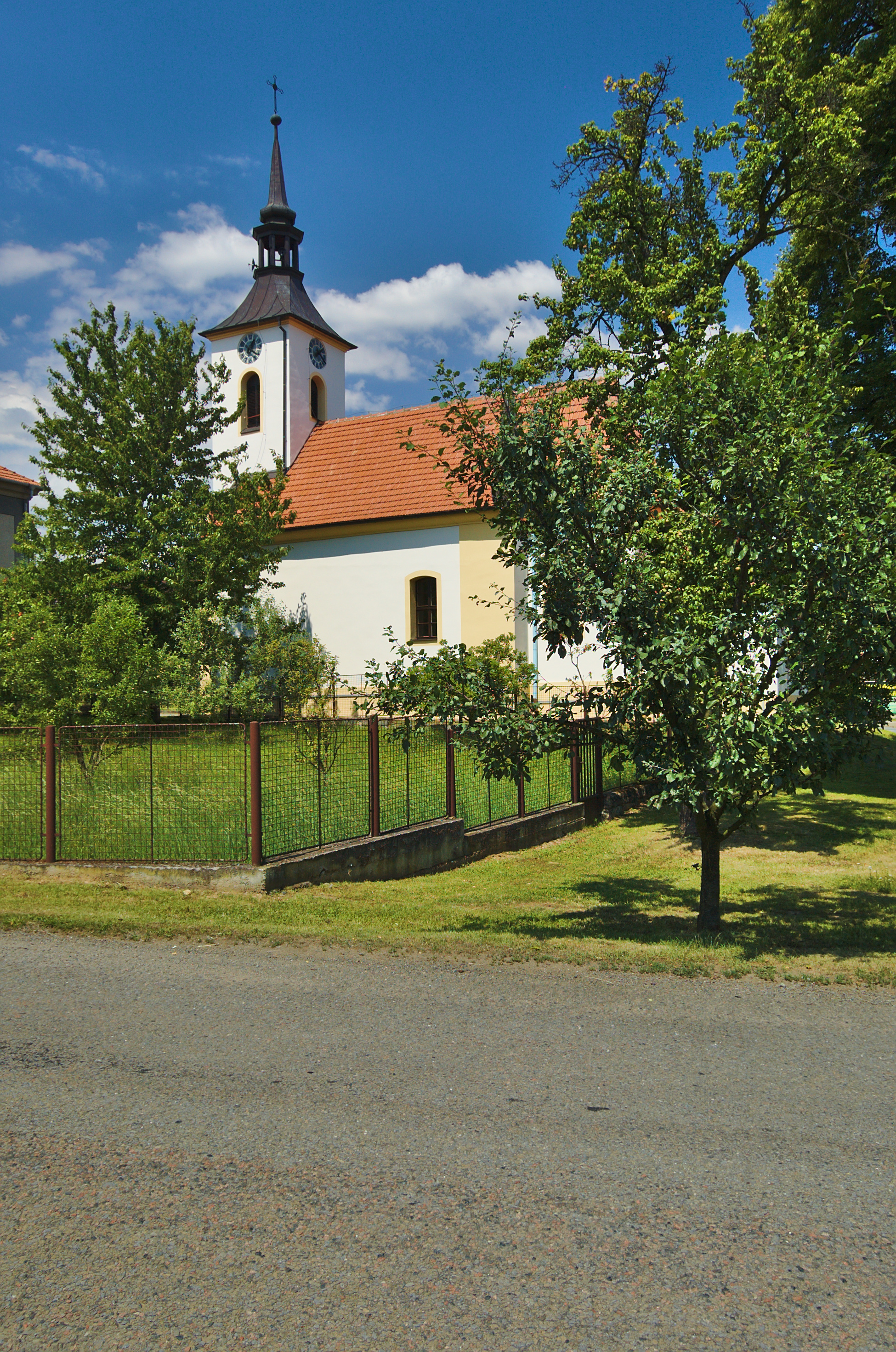 Kostel svatého Floriána - boční pohled, Vícov, okres Prostějov